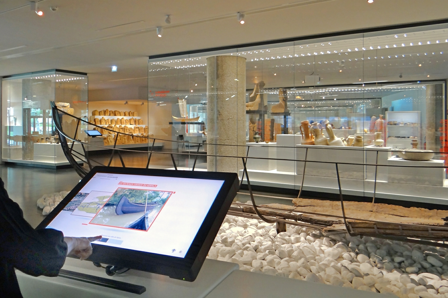 Ecran tactile devant une épave d'un navire du IIIème siècle après J.-C – Bateau de servitude portuaire L'explication sur écran porte sur les techniques de construction navale des bateaux cousus (comparaison avec les bateaux du Kerala) La Ville de Marseille possède une collection exceptionnelle de six navires datant de la fin du VIème siècle avant J.-C au IIIème siècle après J.-C. Cinq de ces épaves ont été trouvées lors de la fouille archéologique de la place Jules Verne, en 1992. Le musée d’Histoire de Marseille a été remarquablement rénové au niveau de la muséographie, des salles et services annexes et des dispositifs multimédias numériques, à l'occasion de la grande manifestation Marseille-Provence 2013. Il présente sur 3.500 m2 des objets exceptionnels, de la préhistoire à aujourd'hui, en particulier les restes de navires grecs et romains, découverts dans les fouilles du quartier du centre Bourse et de la place Jules Verne, des maquettes de Marseille à différentes époques, de nombreuses archives et oeuvres d'art... A l'extérieur du musée, un jardin des vestiges a été aménagé sur le site de la "corne" de l'ancien port antique (voir la maquette du Lacydon). Le site du musée d'Histoire de Marseille L'extension numérique du musée d'Histoire de Marseille orbes.mobi/grpmt-innovision_extnum-mhm_plateforme-hm/